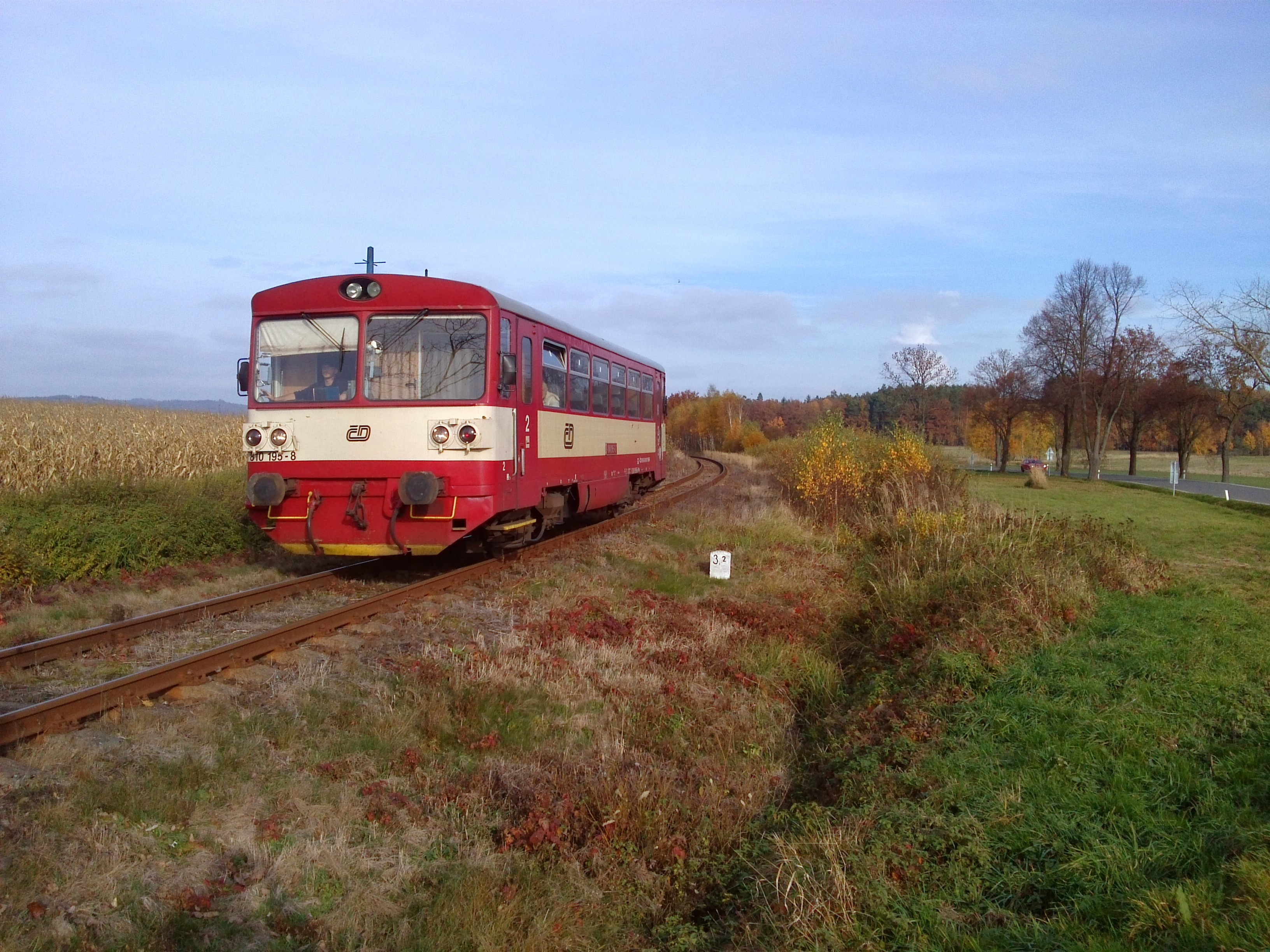 Motorový vůz 810, Újezdec u Číčenic, trať 192, trať Číčenice – Týn nad Vltavou, ČD, 810.195–8